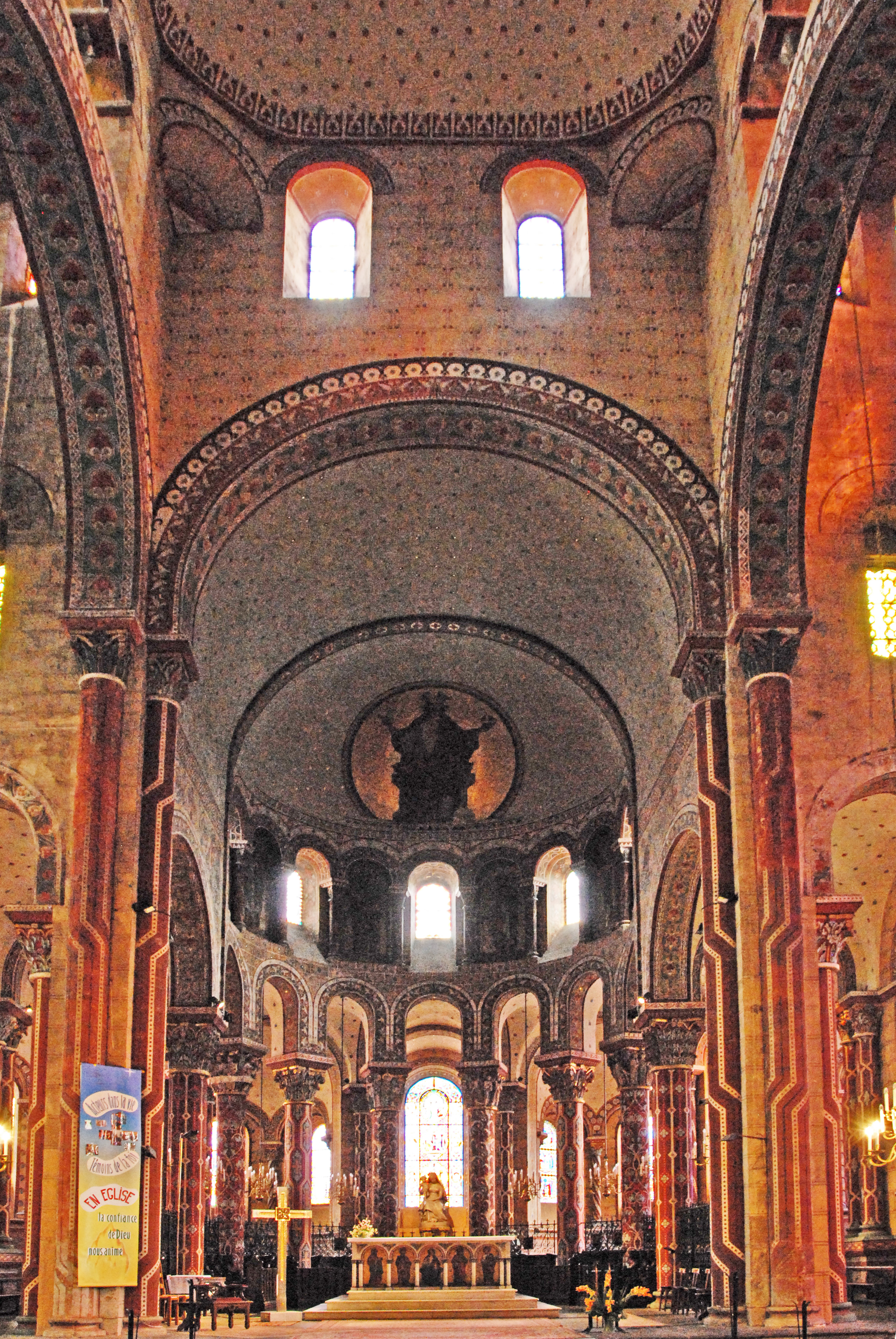 Vierung + Chor